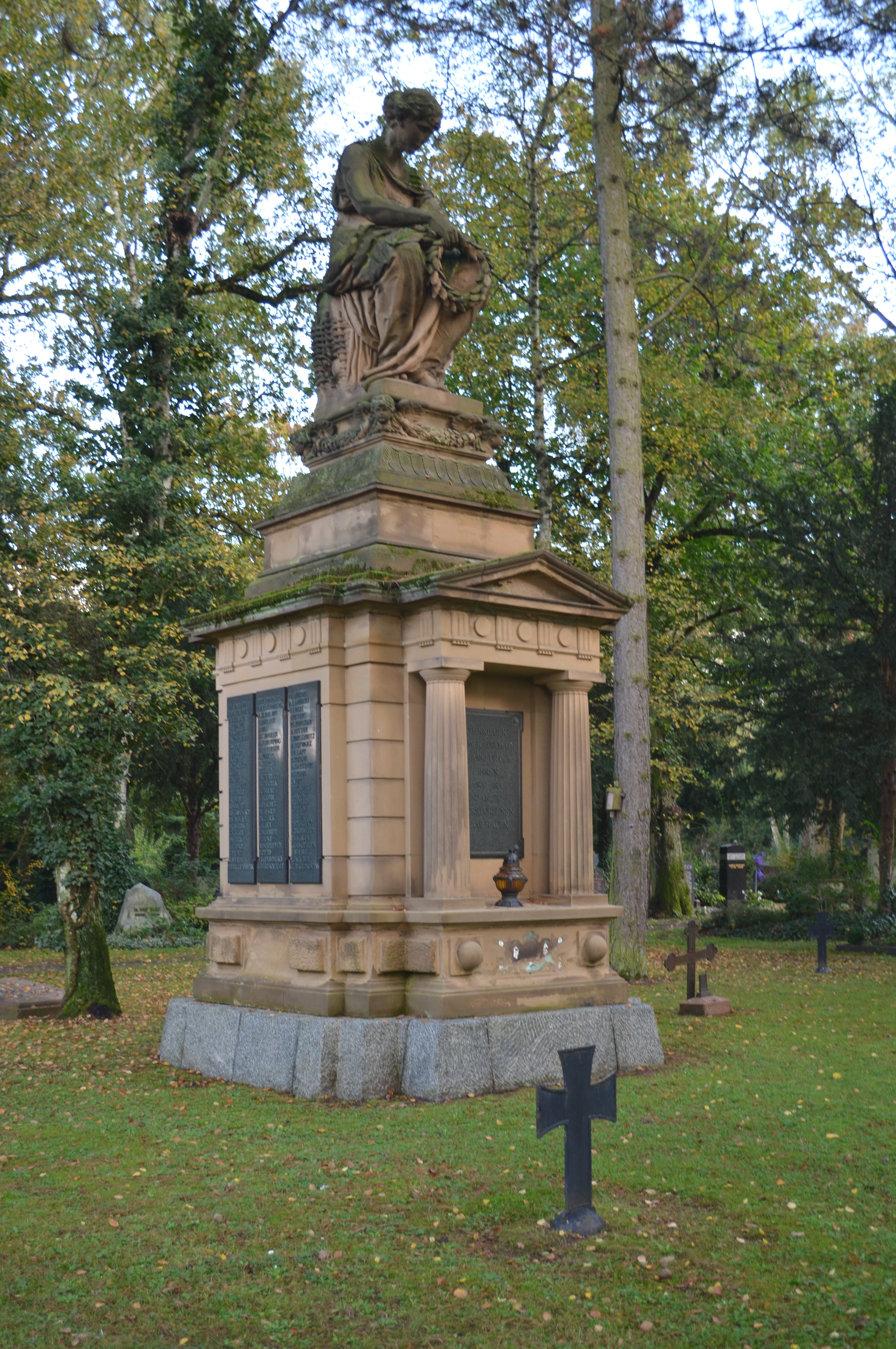 Frankfurt, Südfriedhof, Ehrenmal 1870/71